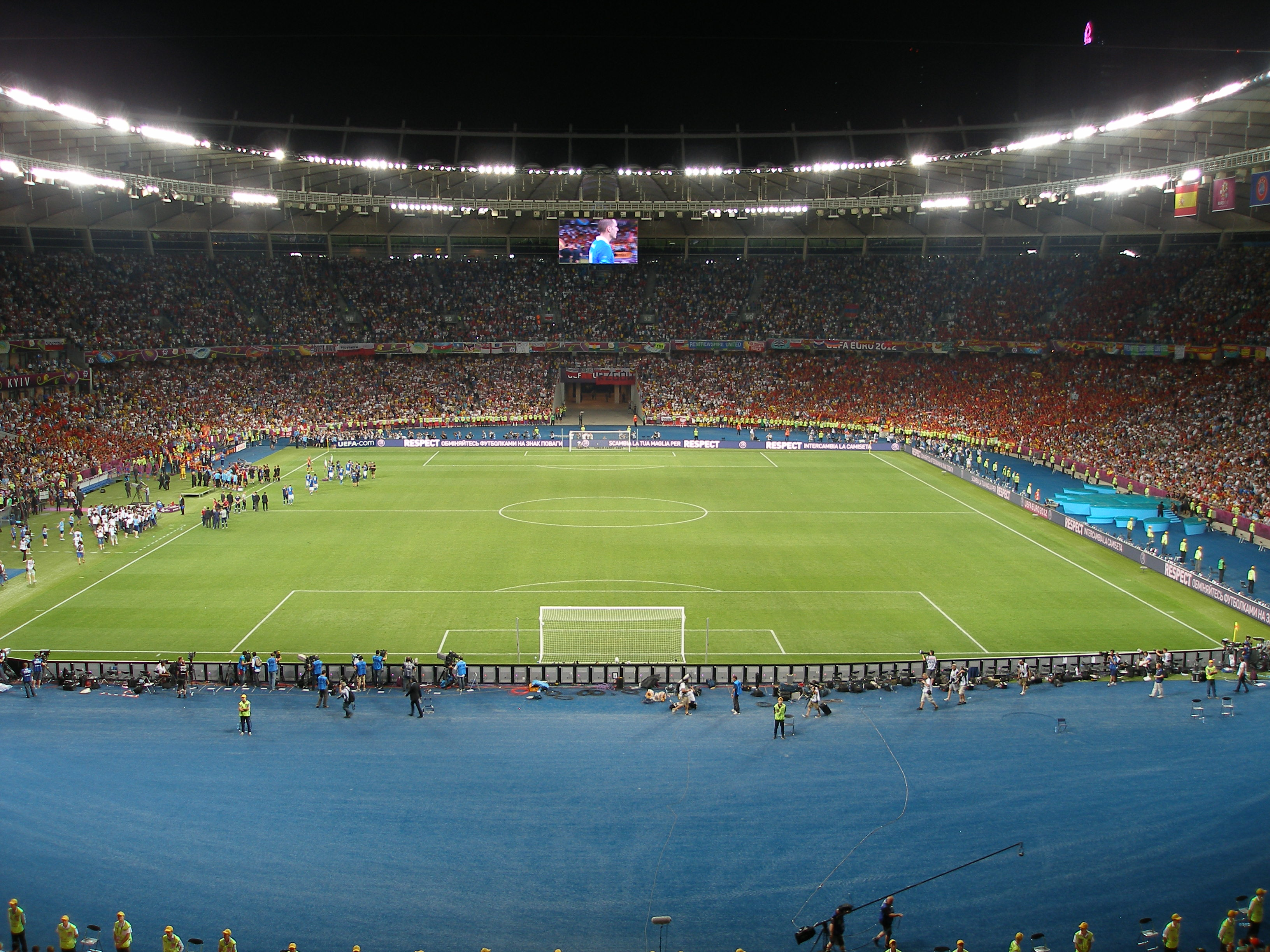 Фінал Євро-2012. НСК «Олімпійський». 3 хвилини після фінального свистка.